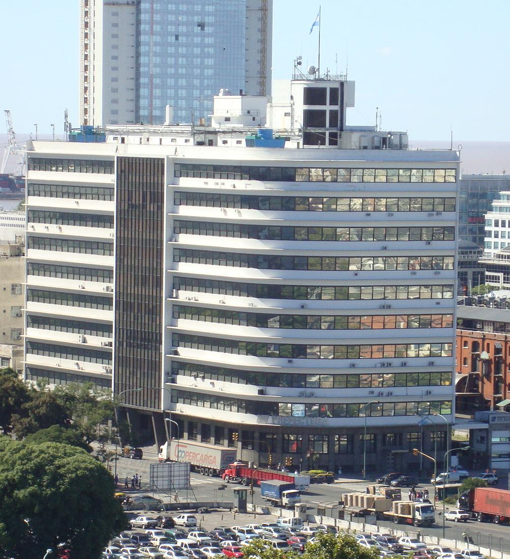 Vista del Edificio Guardacostas, sede de la Prefectura Naval Argentina, desde la terraza del Palacio de Hacienda. Buenos Aires, Argentina.